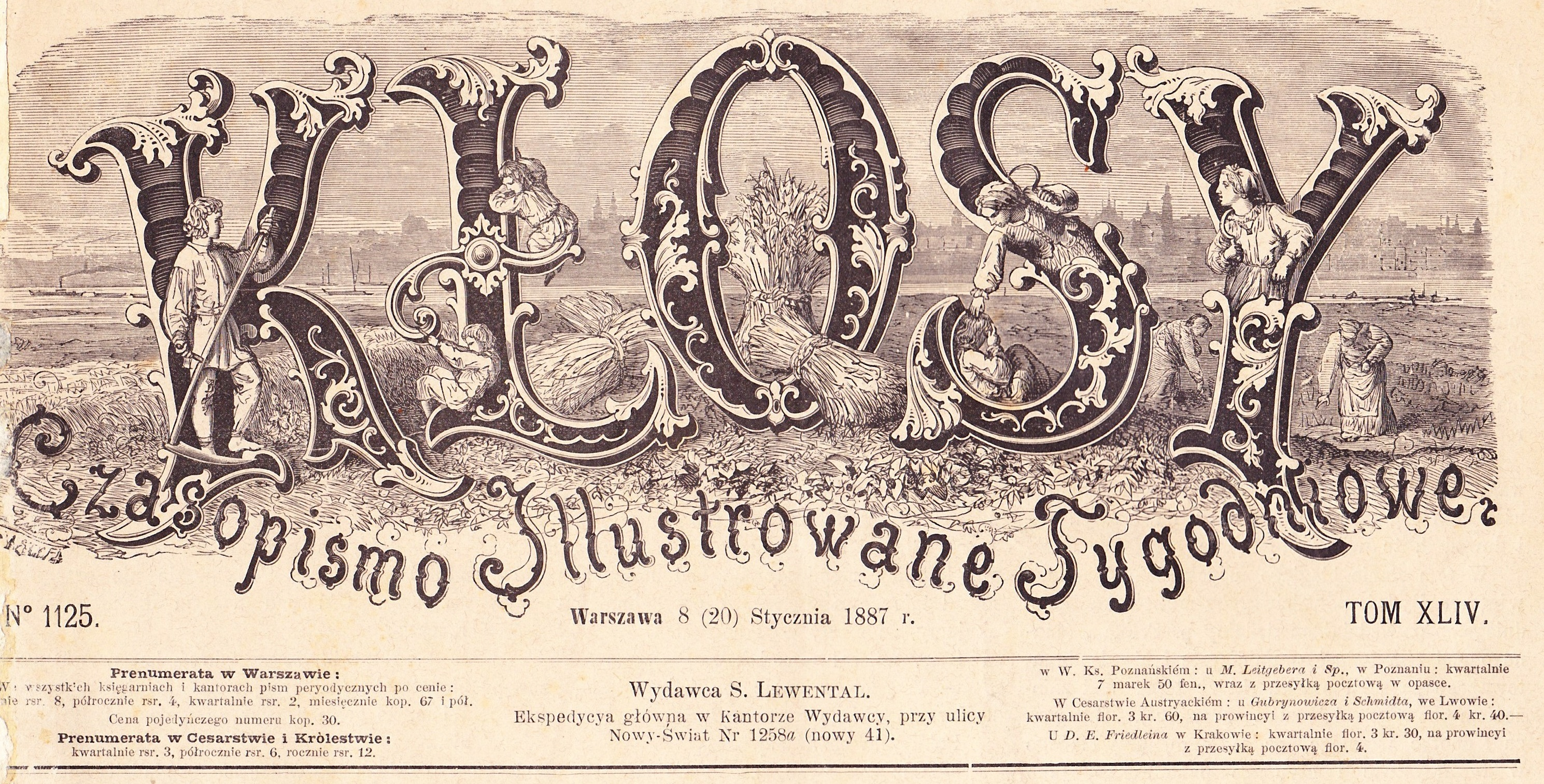 Polski tygodnik ilustrowany, wydawany w Warszawie w okresie 1865–1890.